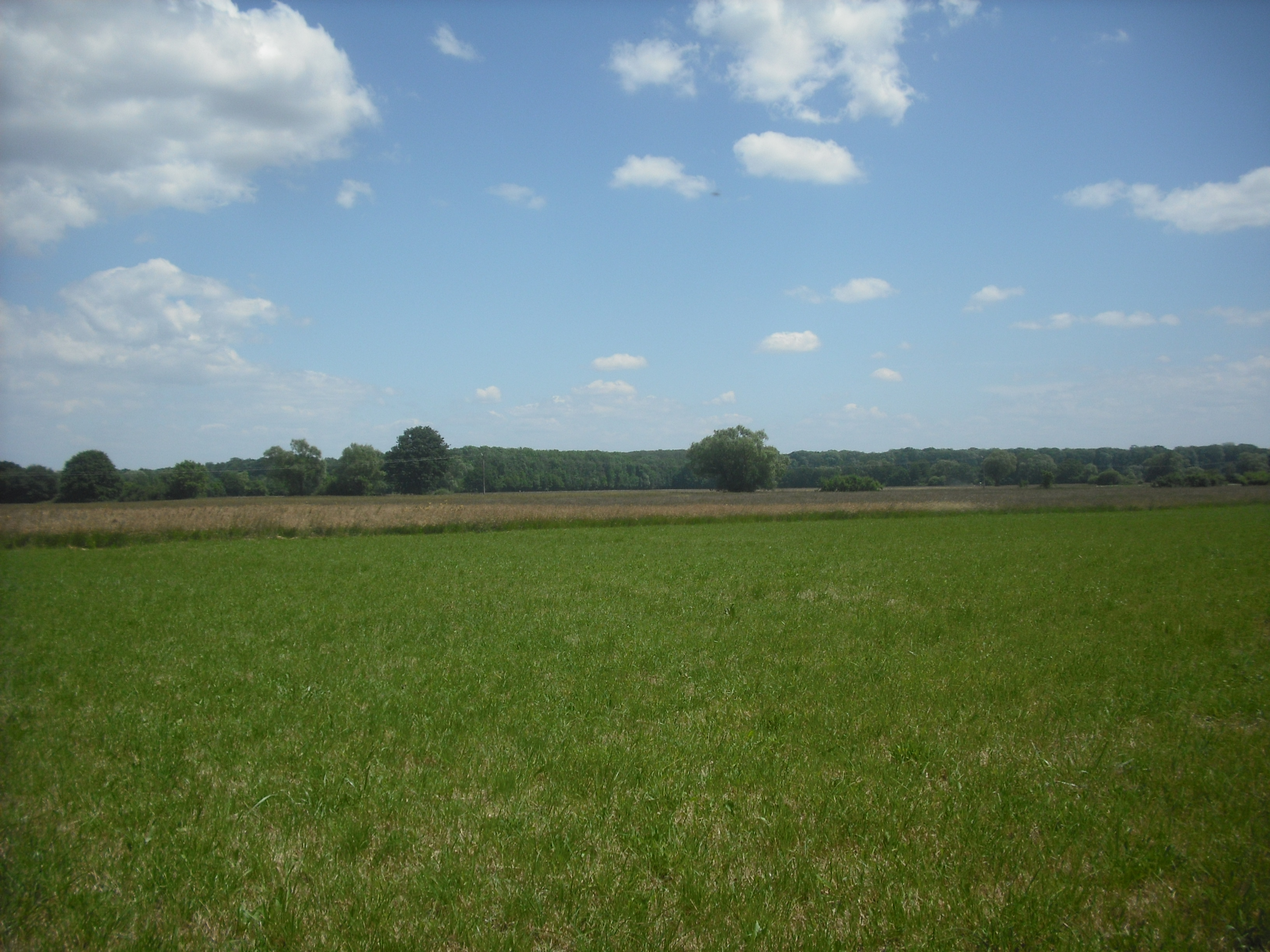 Le Grande Ried, Sélestat, France